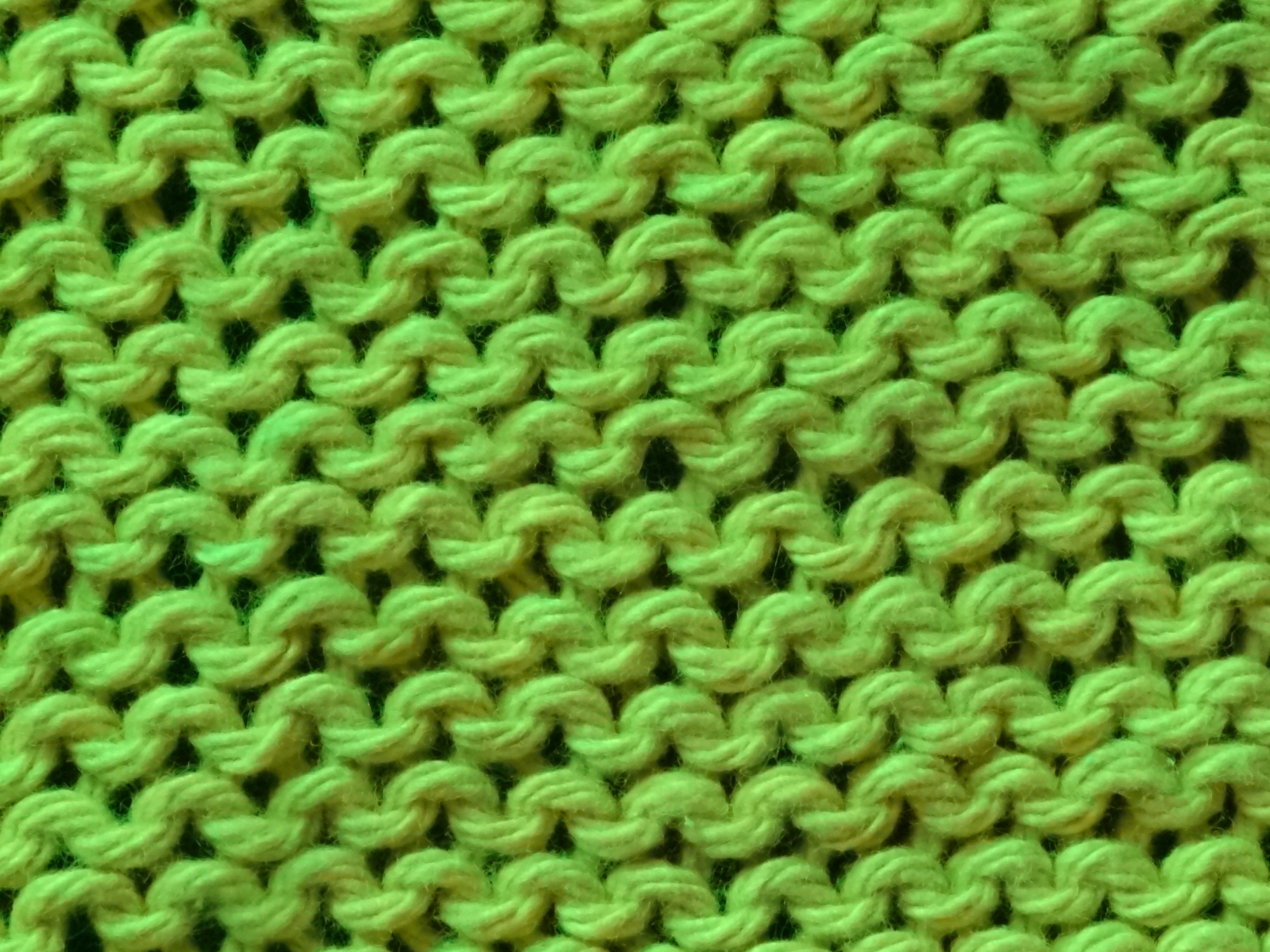 Stricken: glatt rechts gestrickt, Links-Ansicht